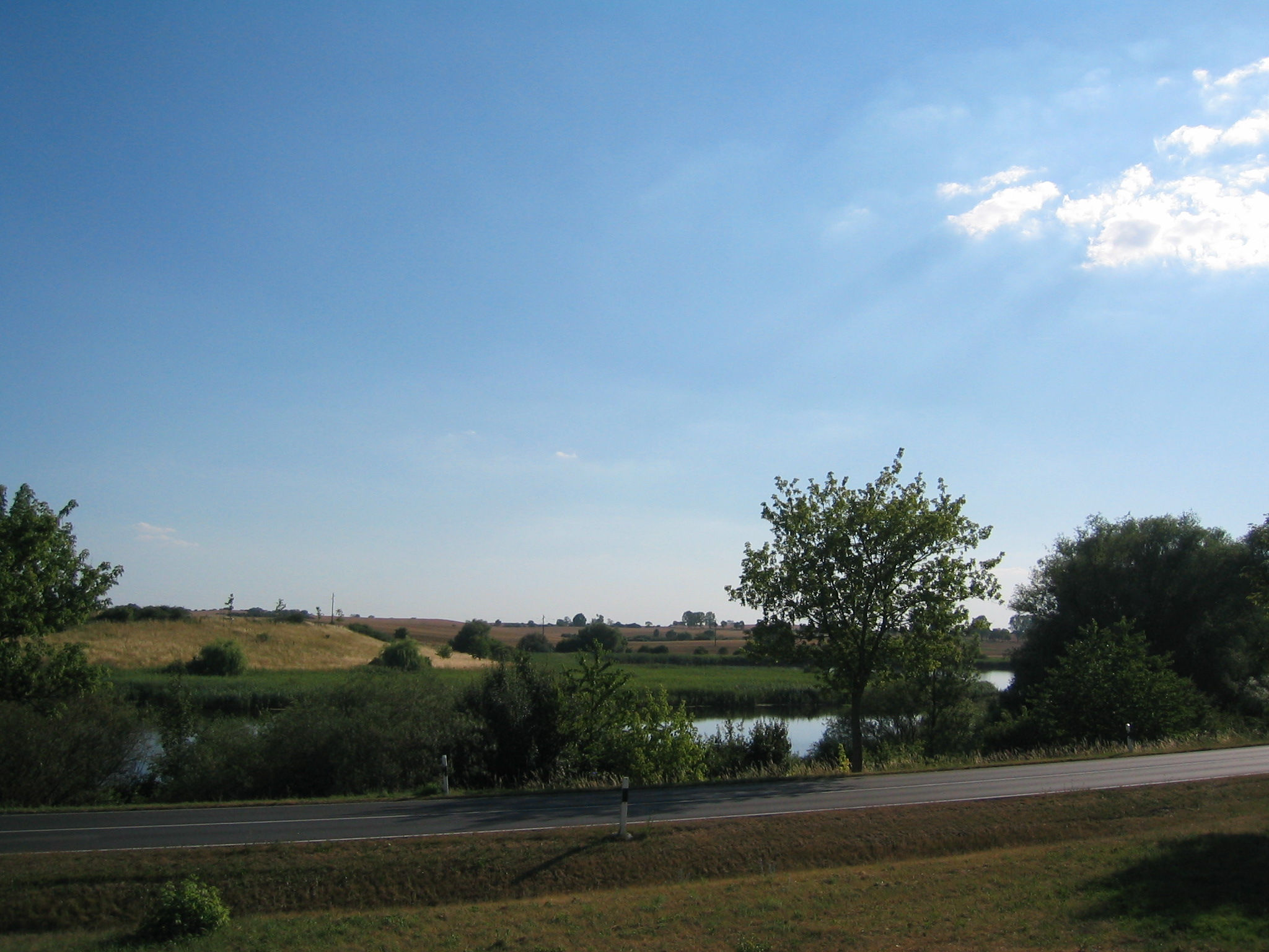 Haussee in Bietikow. Im Vordergrund die B198.